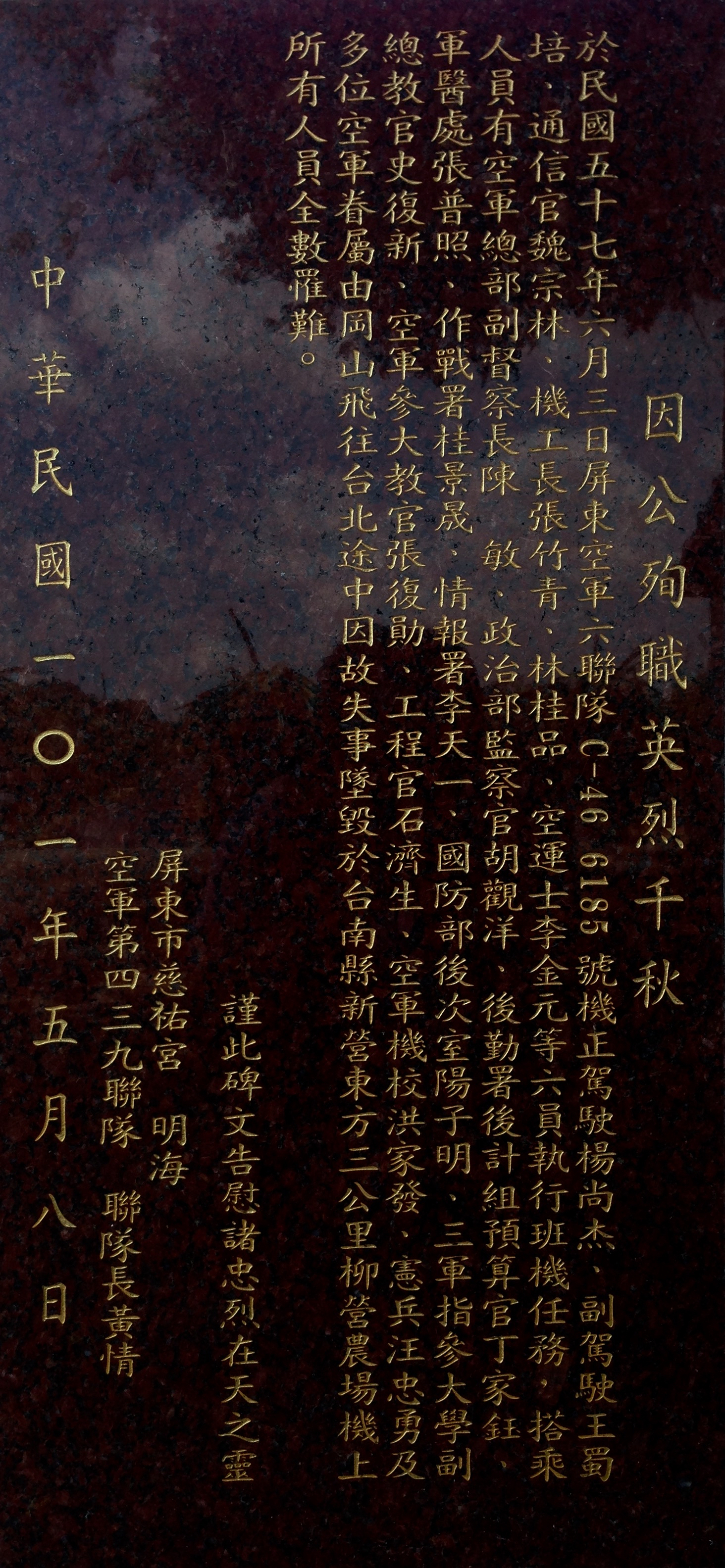 七十二聖人廟的七十二烈士碑文